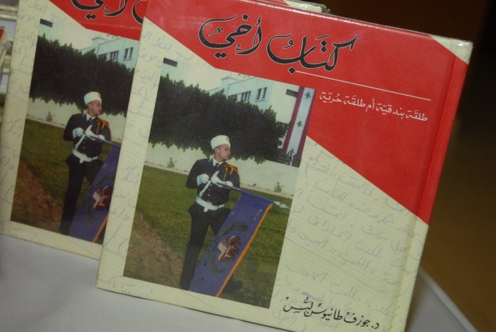 photo couverture